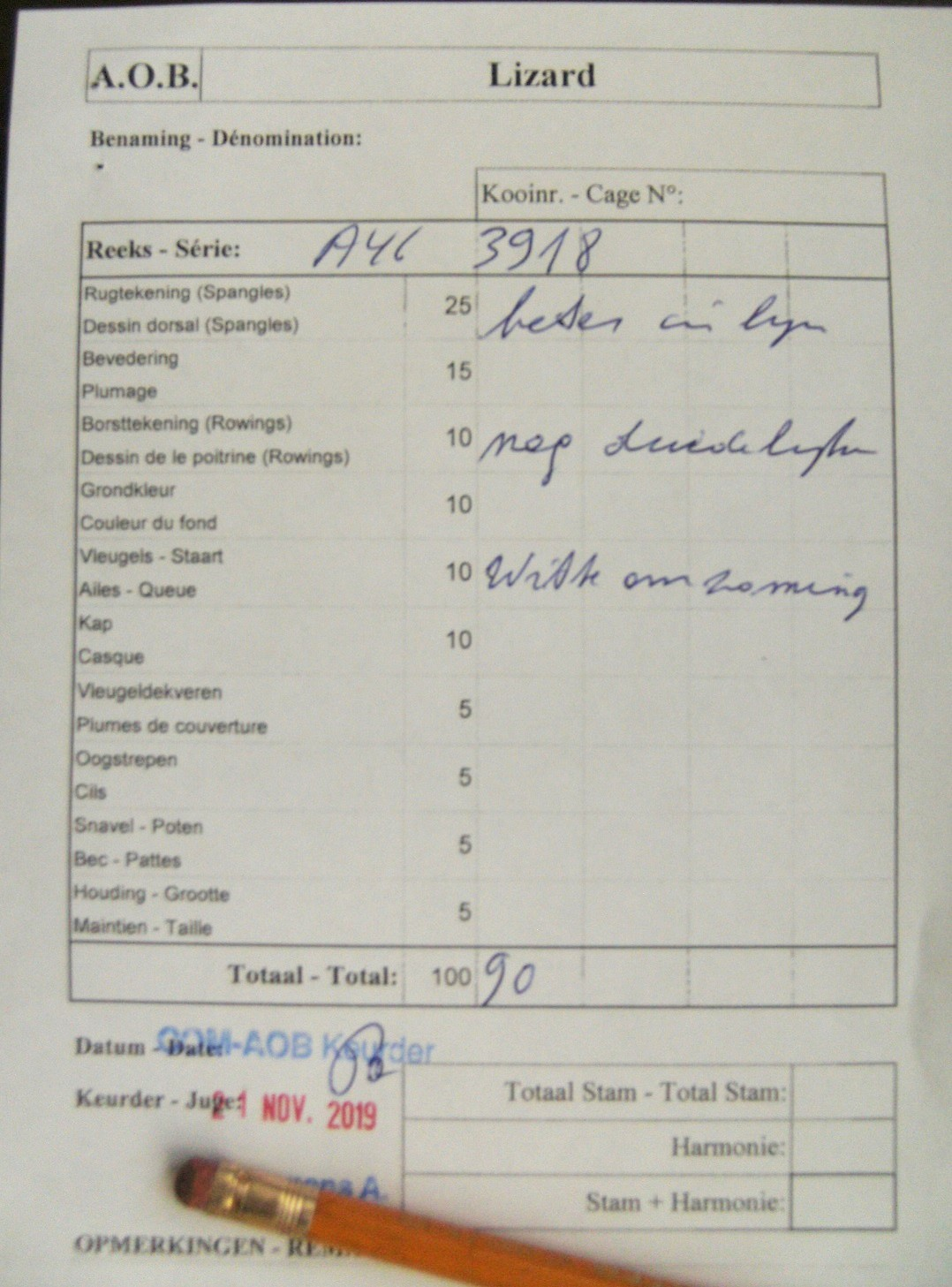 Gekeurde lizard eind november 2019